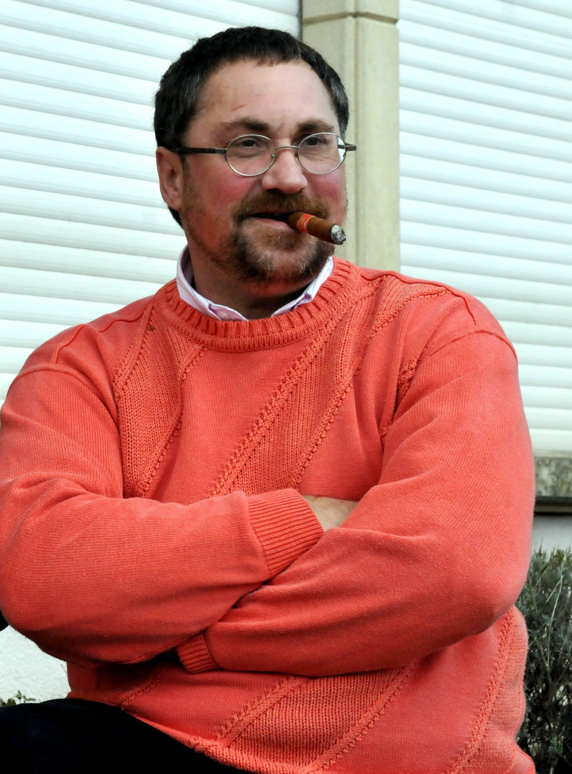 Sujet: Jean Fetz, 2010 Auteur: Jwh Source: eegent Wierk Jwh This photograph was taken with a Nikon D300. This raster graphics image was created with Picasa